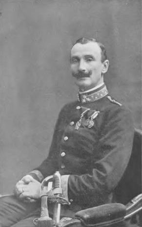 Tadeusz Rozwadowski jako pułkownik w 1910